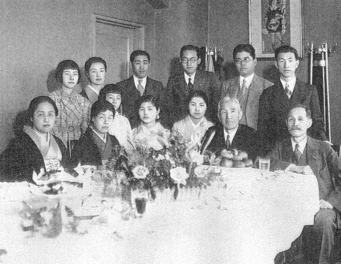 明治製菓元会長の相馬半治（前列右から2人目）